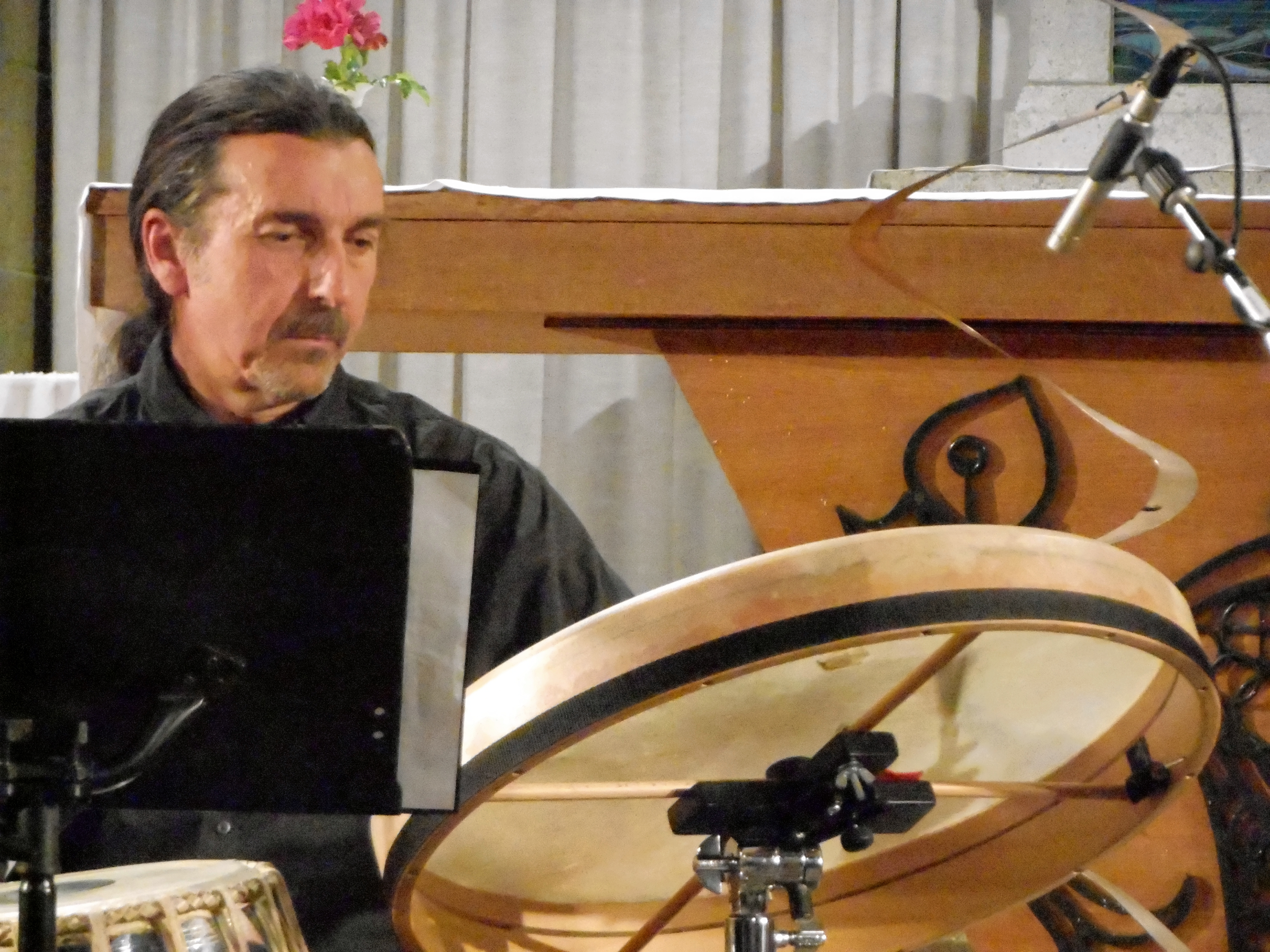 Dominique Molard avec le Ars'ys Quintet et le Chœur Jef le Penven lors du festival de musique Les Lundis Musicaux de Camaret le 30 juillet 2012.